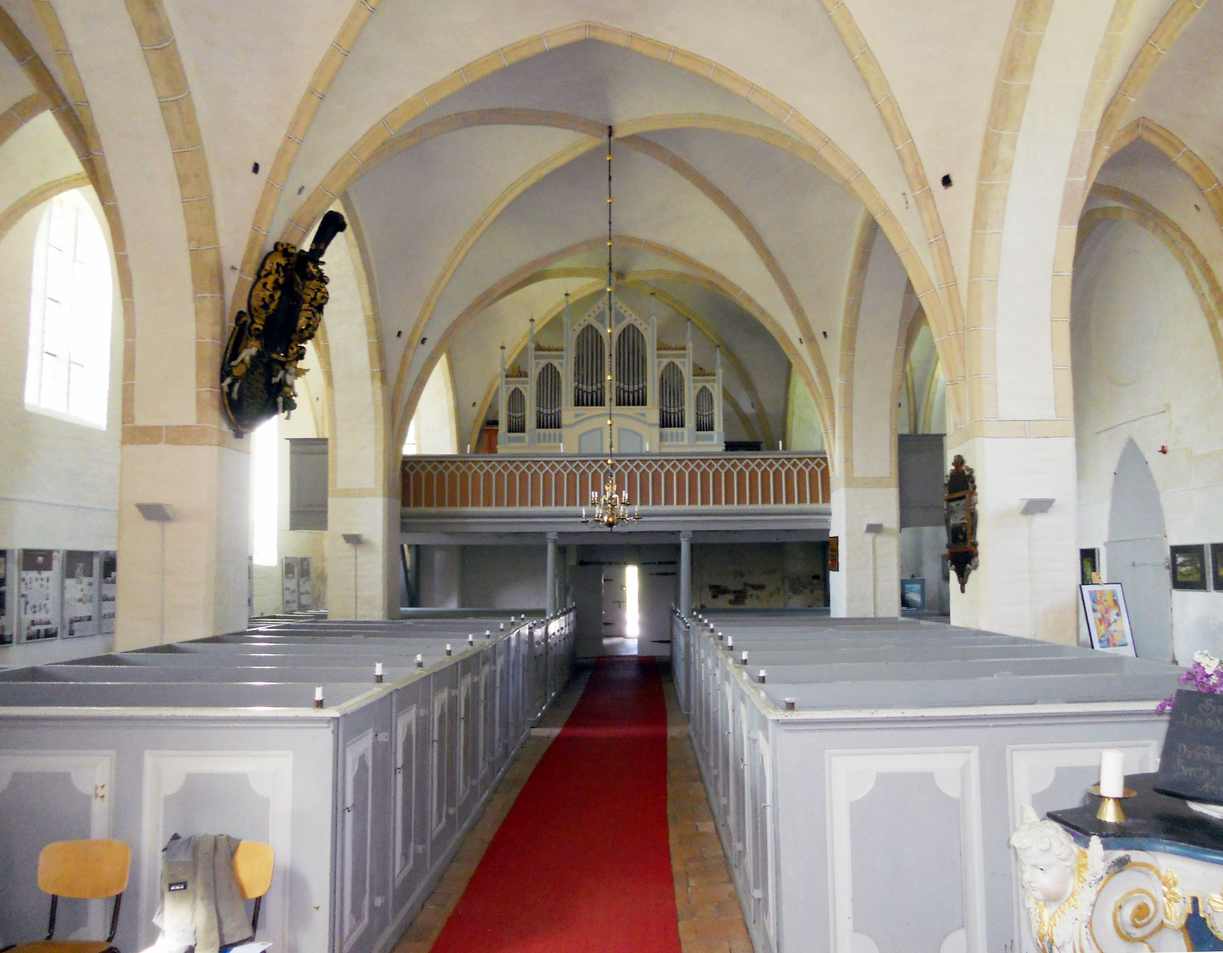 Schiff mit Orgel und Kastengestühl, St.-Katharinenkirche, Trent, Rügen